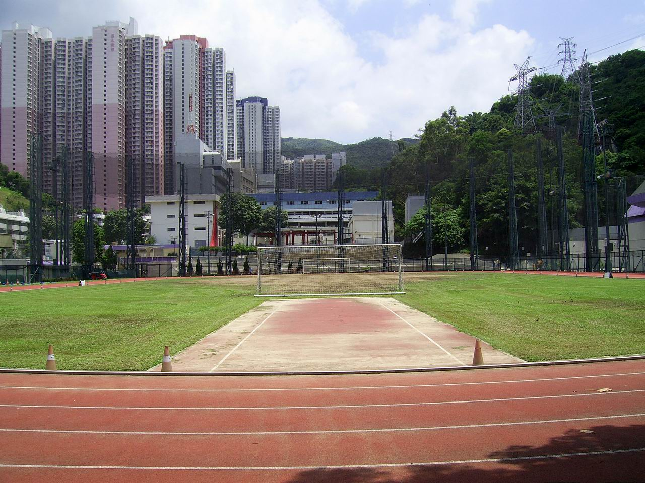 中文（香港）: 和宜合道運動場高爾夫球練習圍網